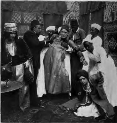 Photo film